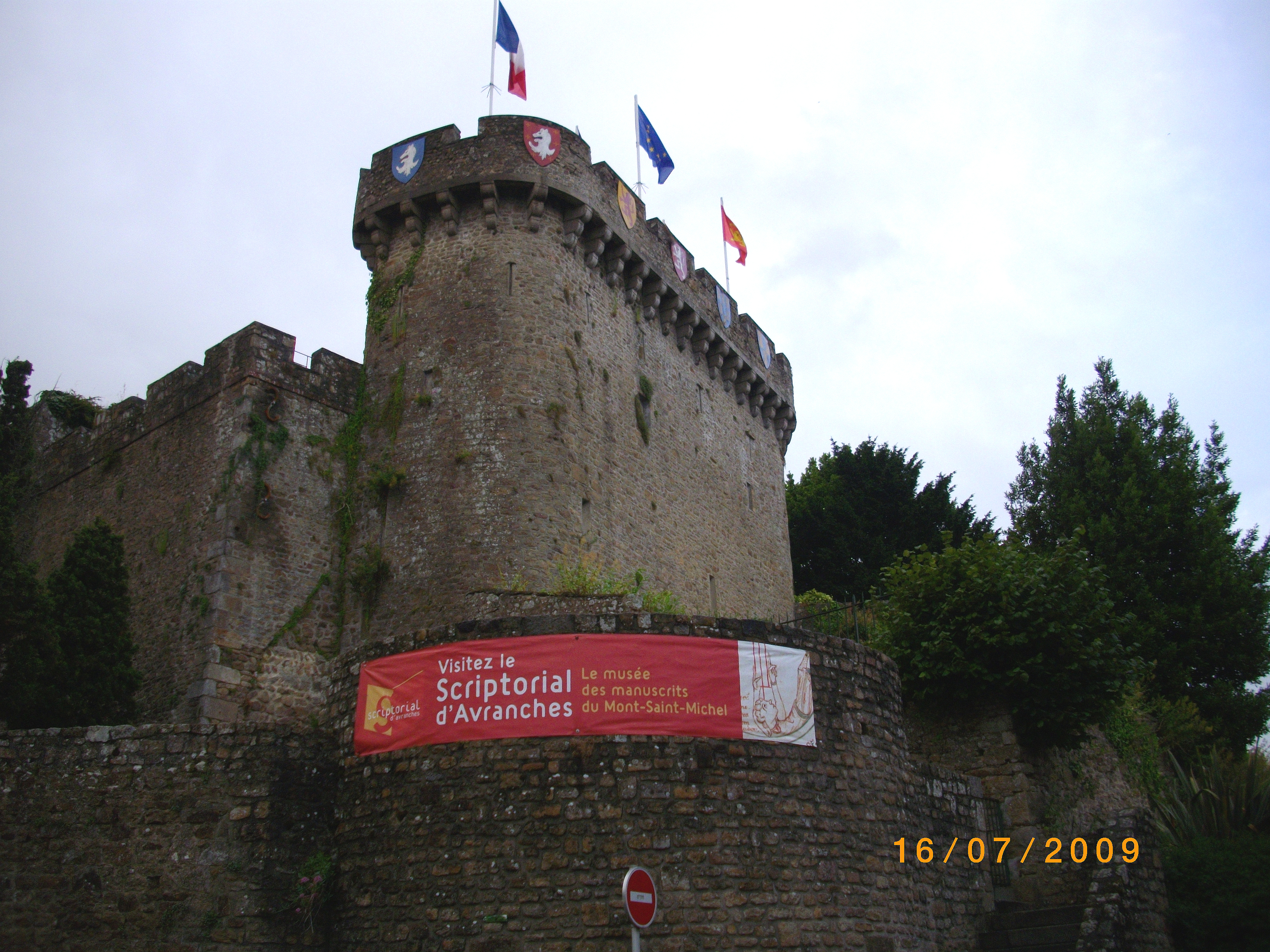 Το κάστρο της Αβράνς (Ντονζόν)